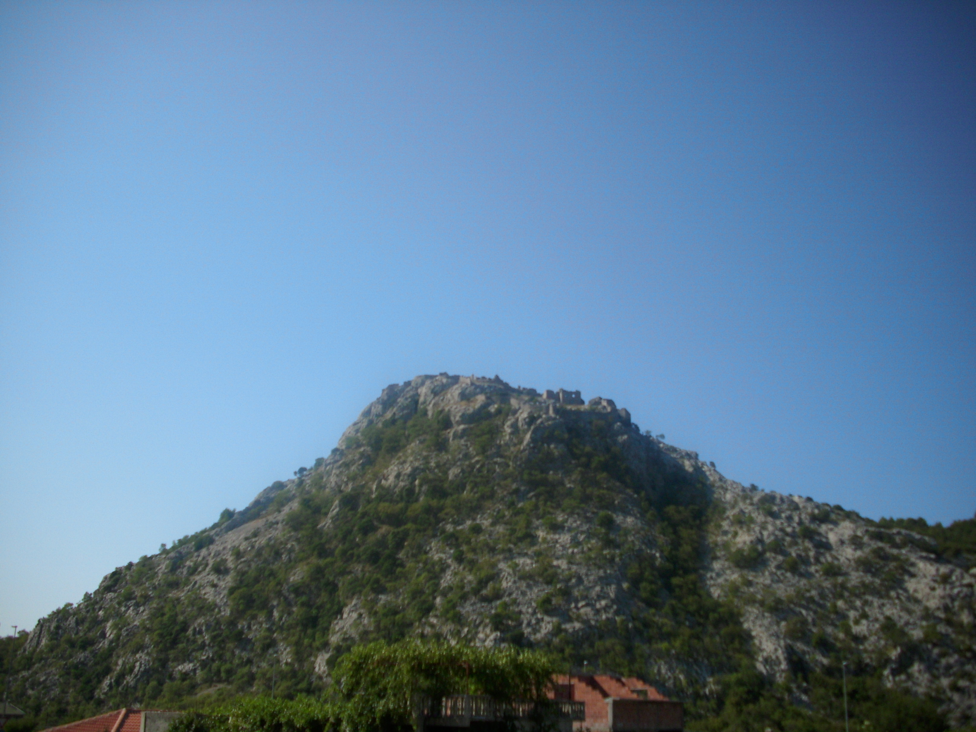 Ostaci tvrđave Haj-Nehaj